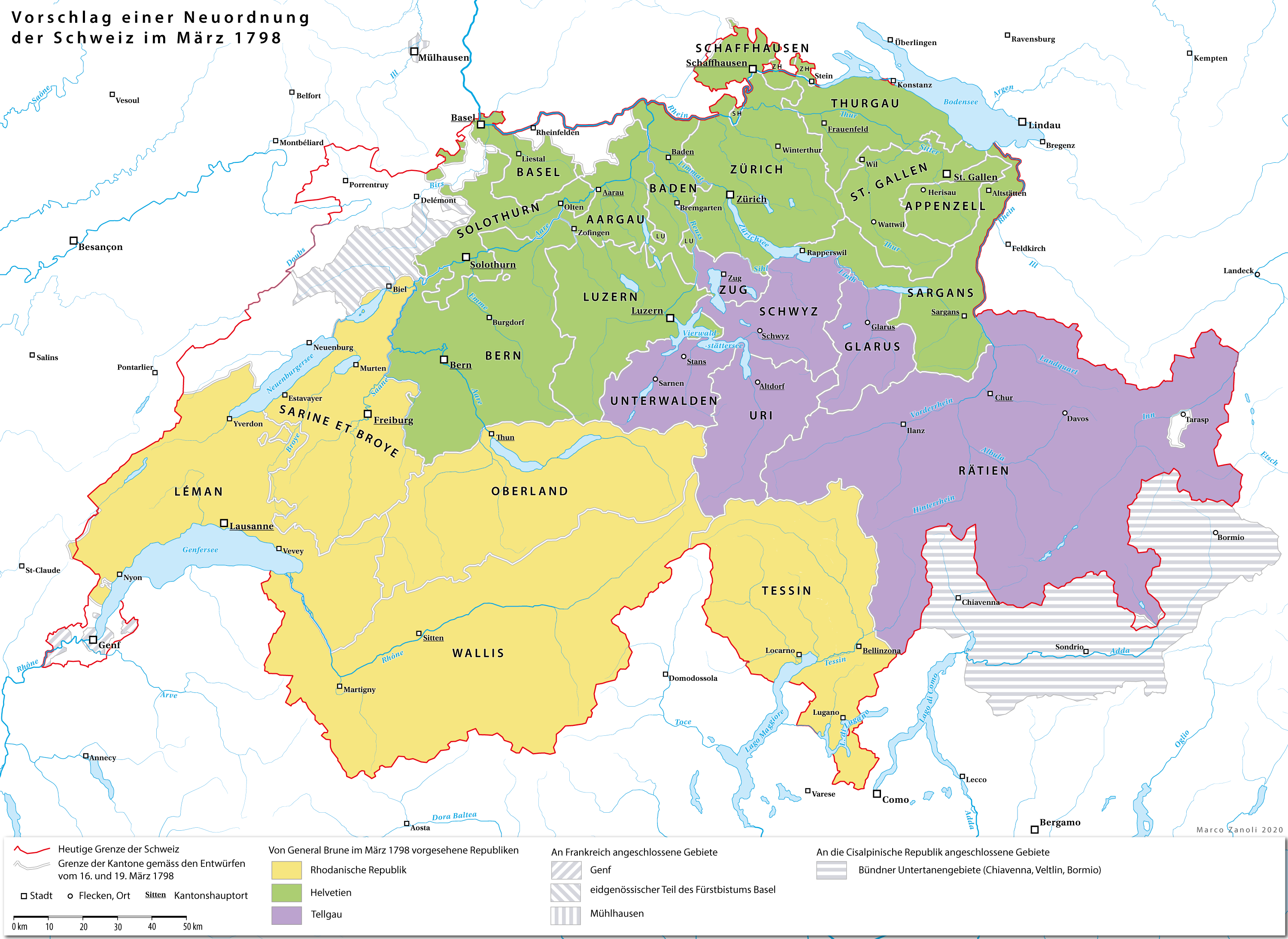 Vorschlag zur Neuordung der Schweiz durch General Guillaume Brun, 16. und 19. März 1798. Brun sah vor, die Alte Eidgenossenschaft in zwei zentralistisch organisierte Republiken nach franz. Vorbild aufzuteilen: Rhodanien und Helvetien. Der Rest der Schweiz sollte unter der Bezeichnung «Tellgau» einen losen Staatenbund bilden. Der Freistaat der Drei Bünde war zum Anschluss an diesen Staatenbund vorgesehen